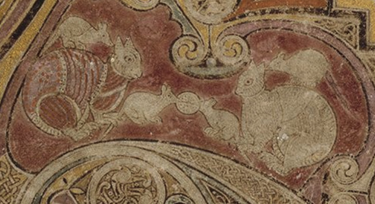 Detail der Initialseite „XRO“ im Book of Kells: Katzen und Mäuse[1]